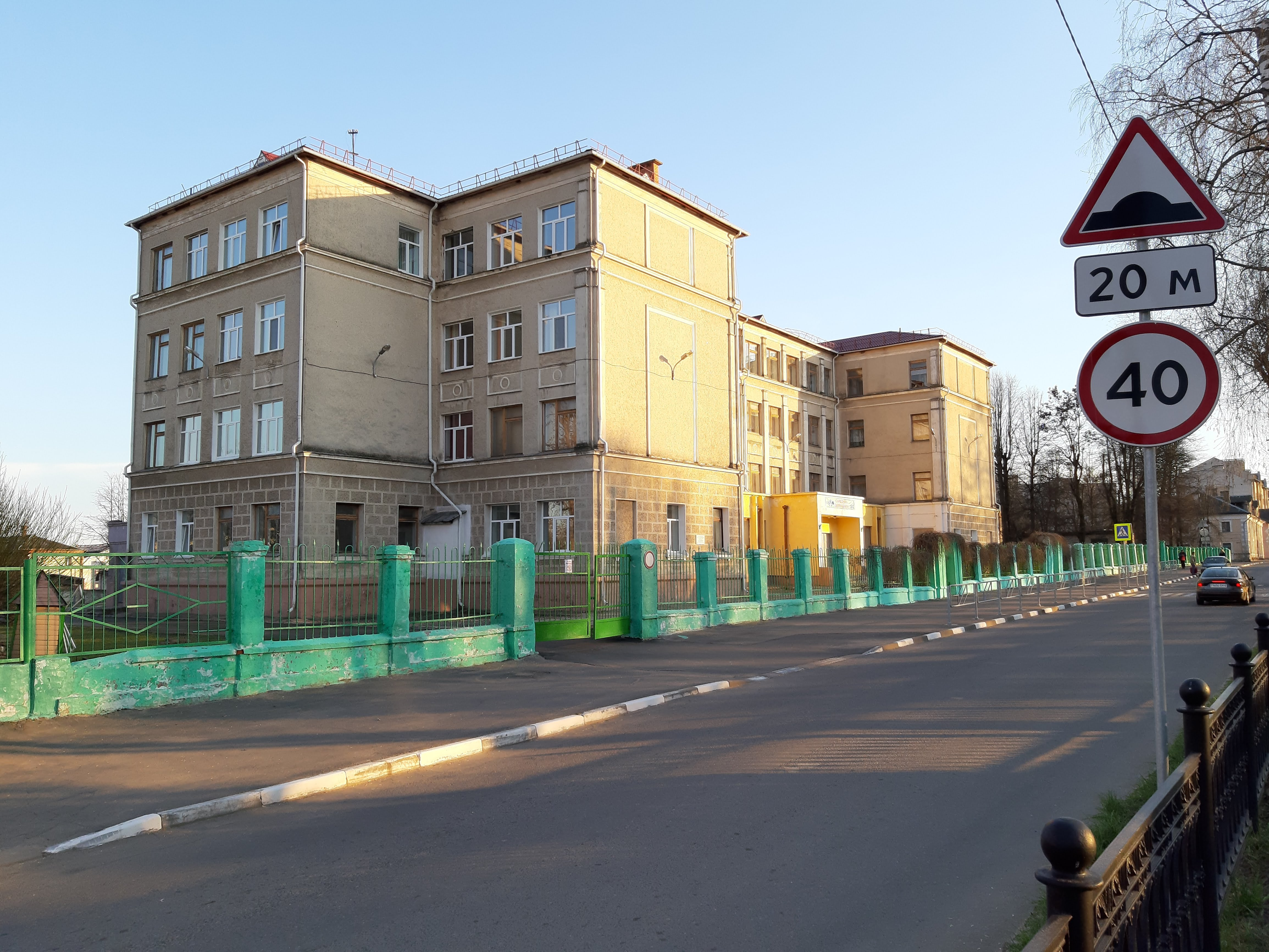 Магілёў. Вуліца Мянжынскага